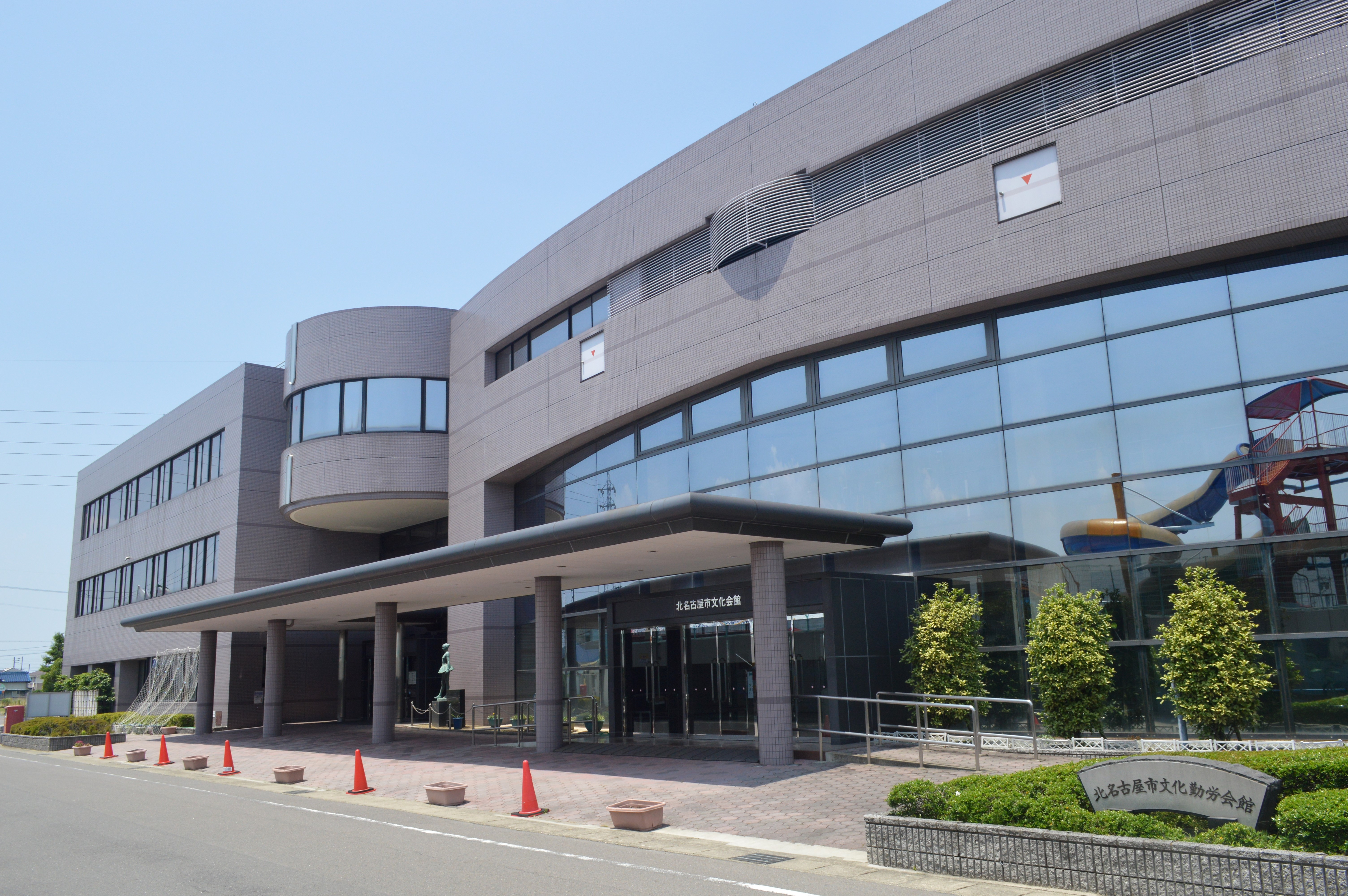 愛知県北名古屋市にある北名古屋市文化勤労会館。北名古屋市西図書館などが入っている。